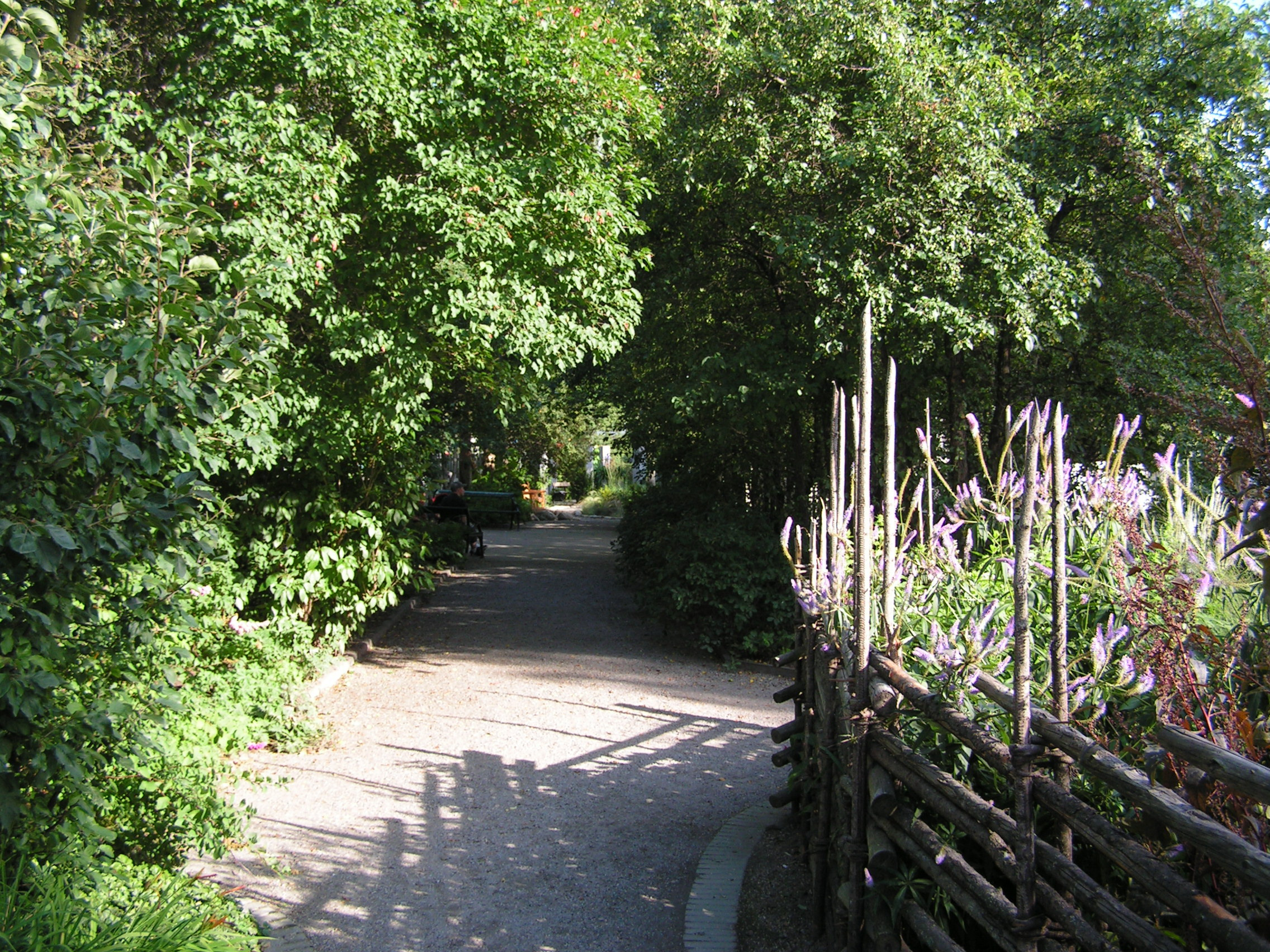 Trädgård i Norr, Umeå, Sweden